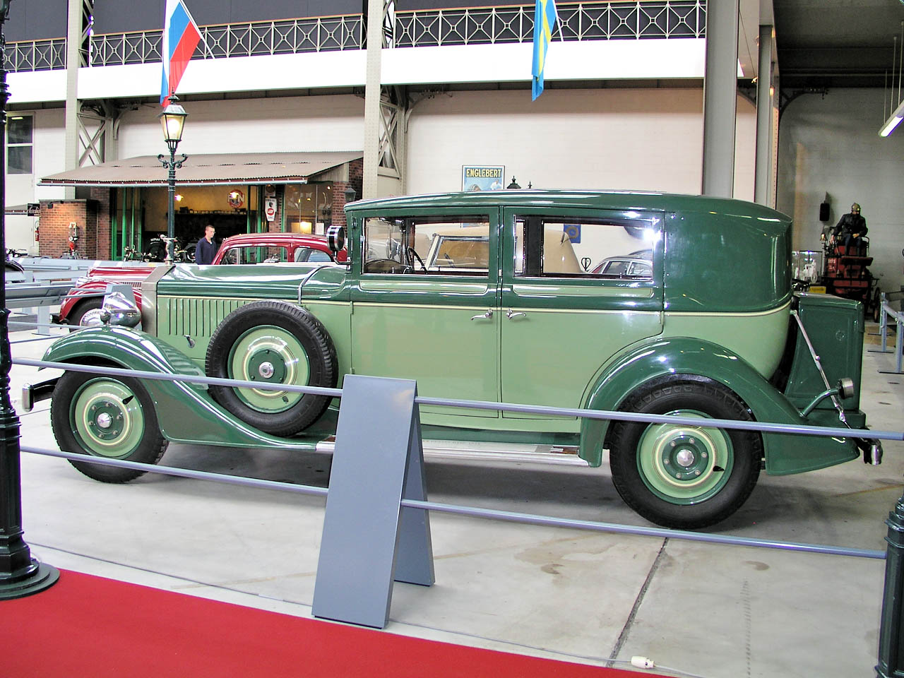 luxury car based on French Sizaire Frères designs, made in Belgium by Sté Belge des Automobiles Sizaire; side view